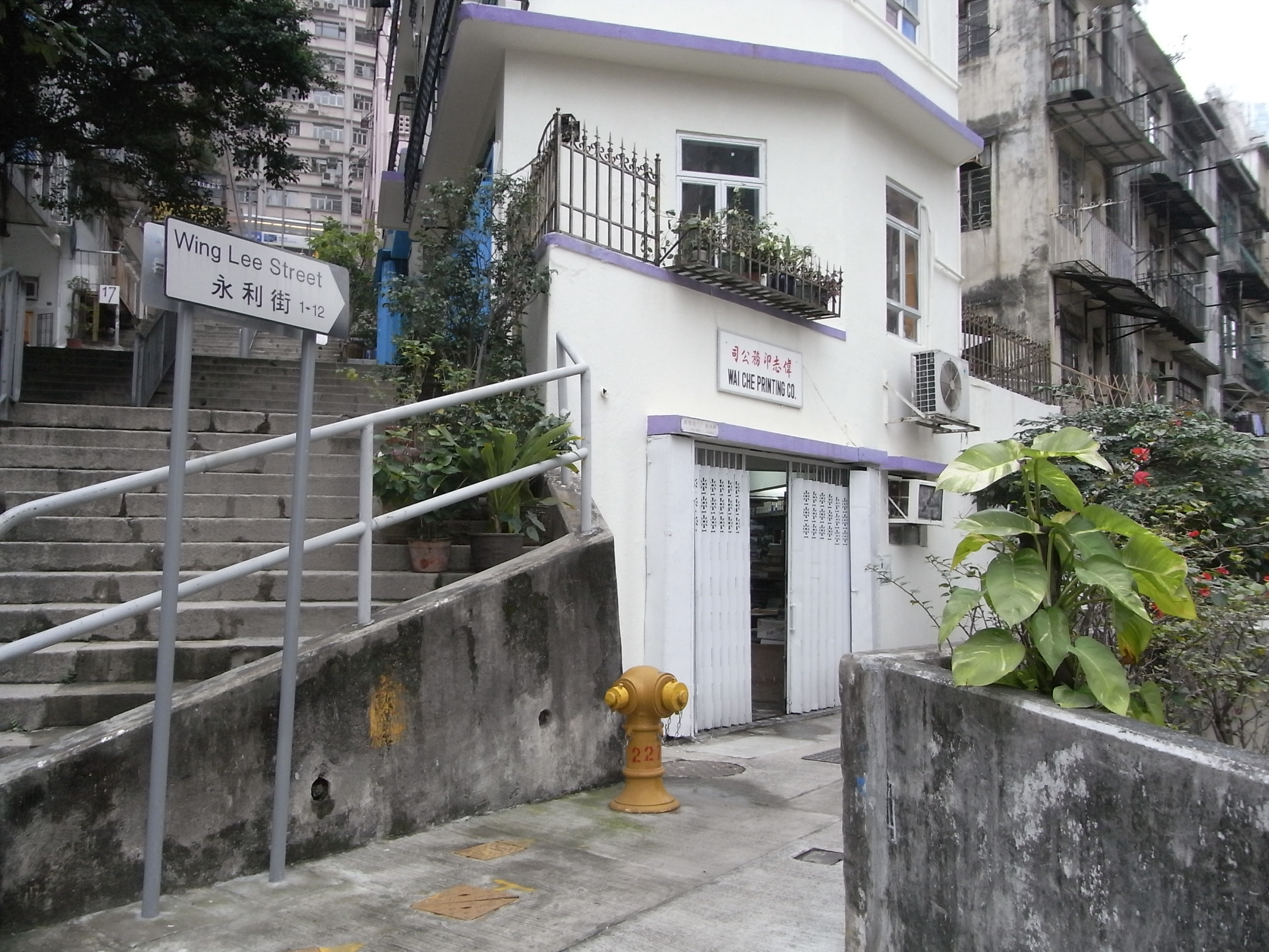 香港上環永利街及城皇街交界